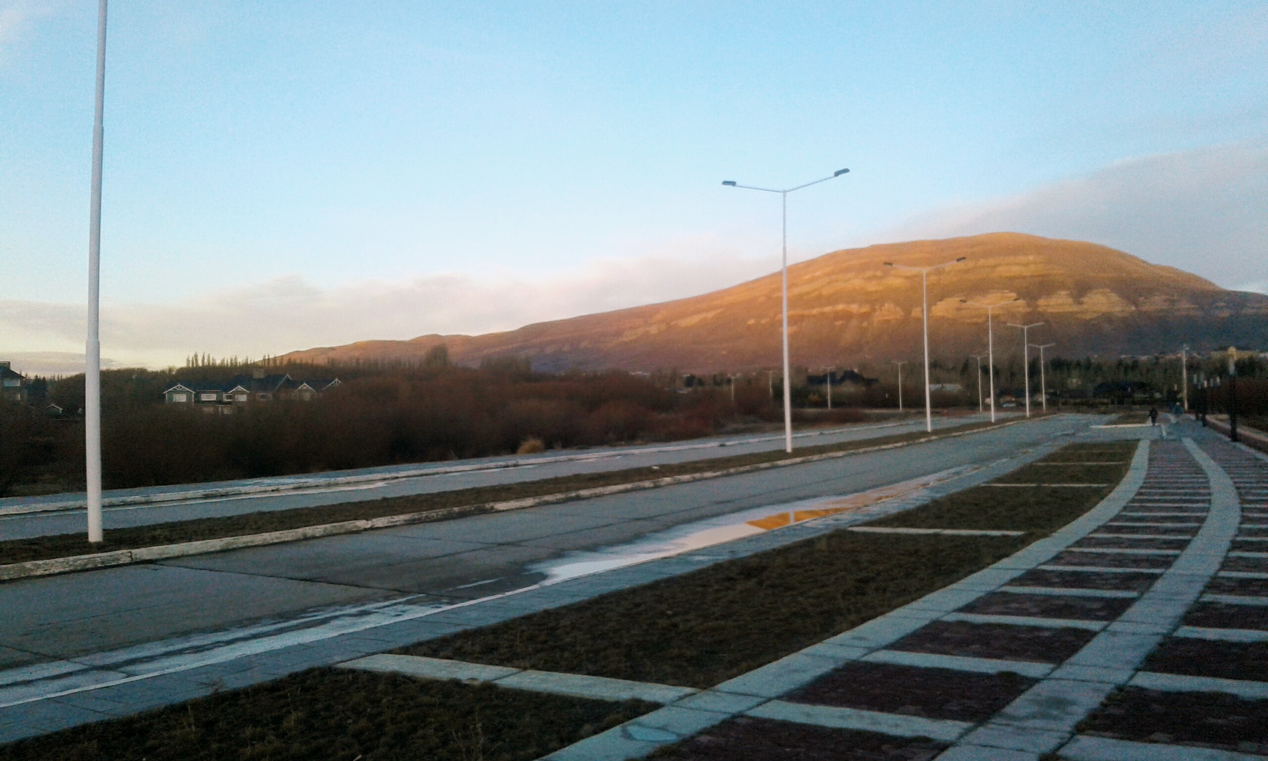 Atardecer de mi pueblo.